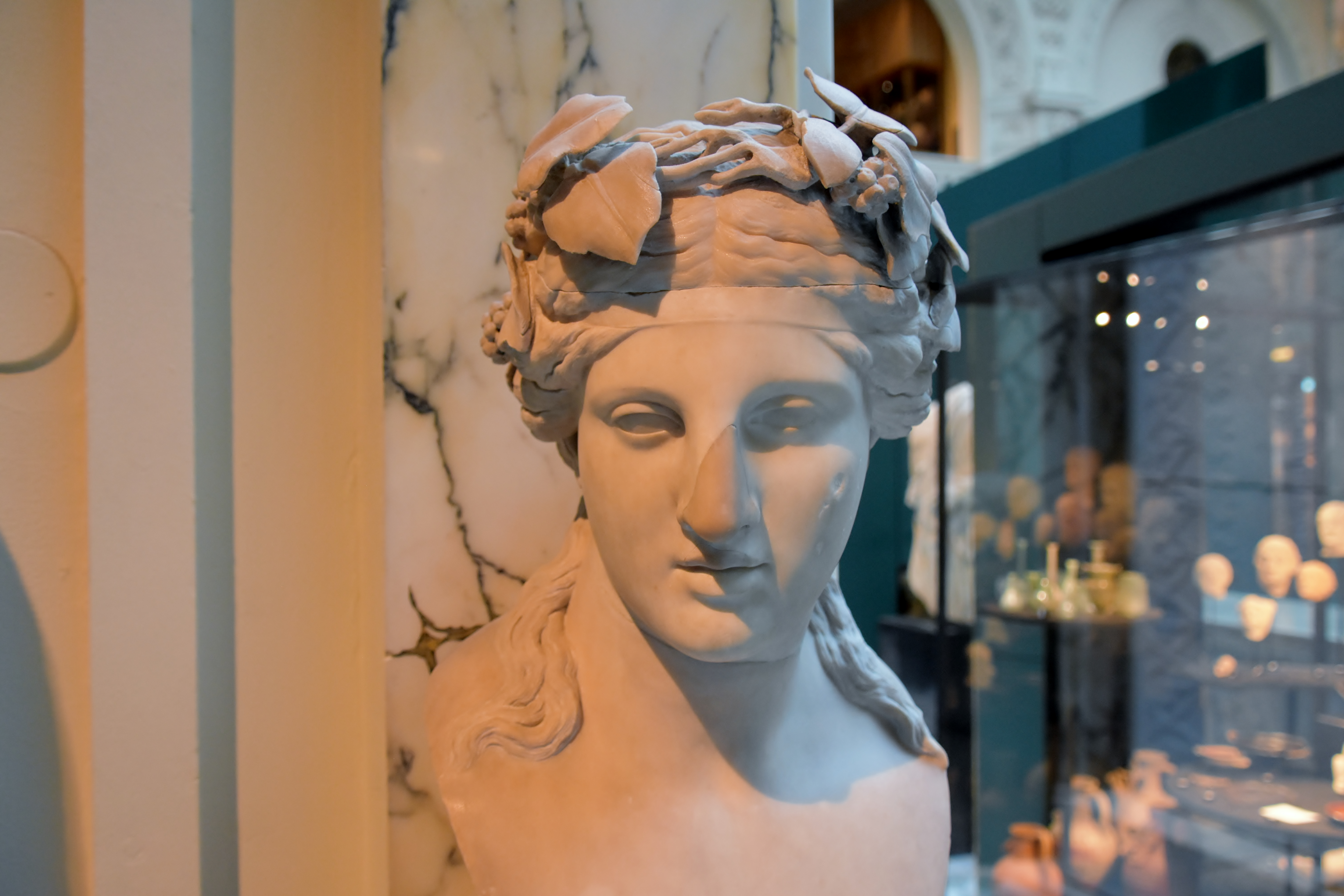 Dionysus, Roman, 2nd cent. CE, Medelhavsmuseet, Stockholm